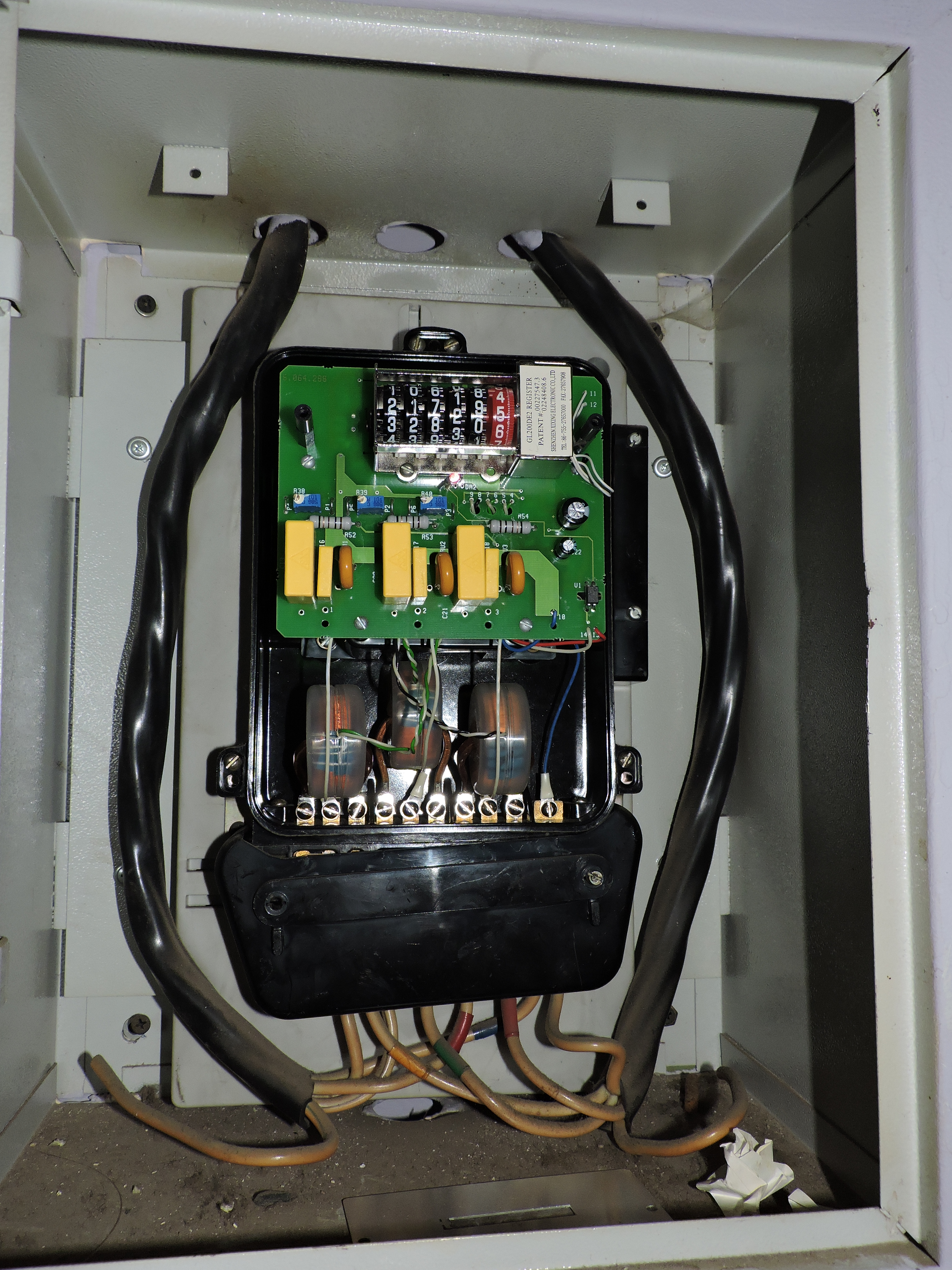 Раскуроченный электросчётчик в электрощитке. Опломбированная крышка снята, что делает его эксплуатацию нелегальной